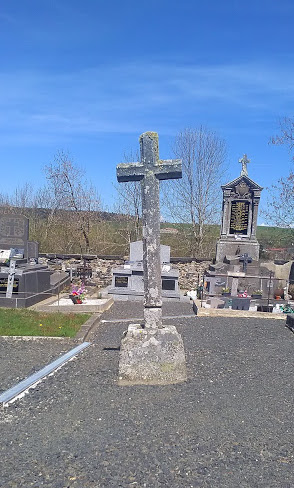 Croix ancienne dans le cimetierre de Rageade (Cantal).